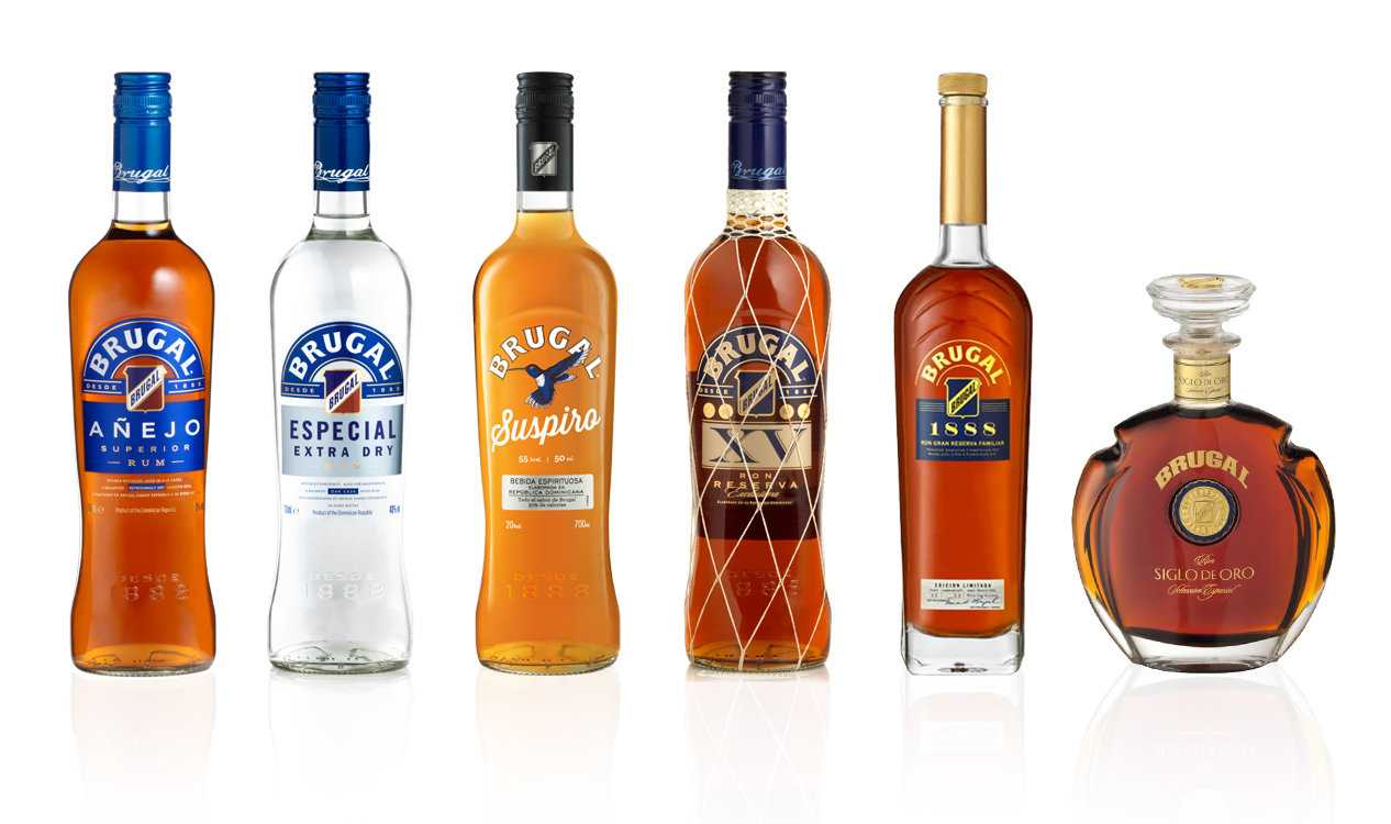 Coleccion Botellas Ron Brugal